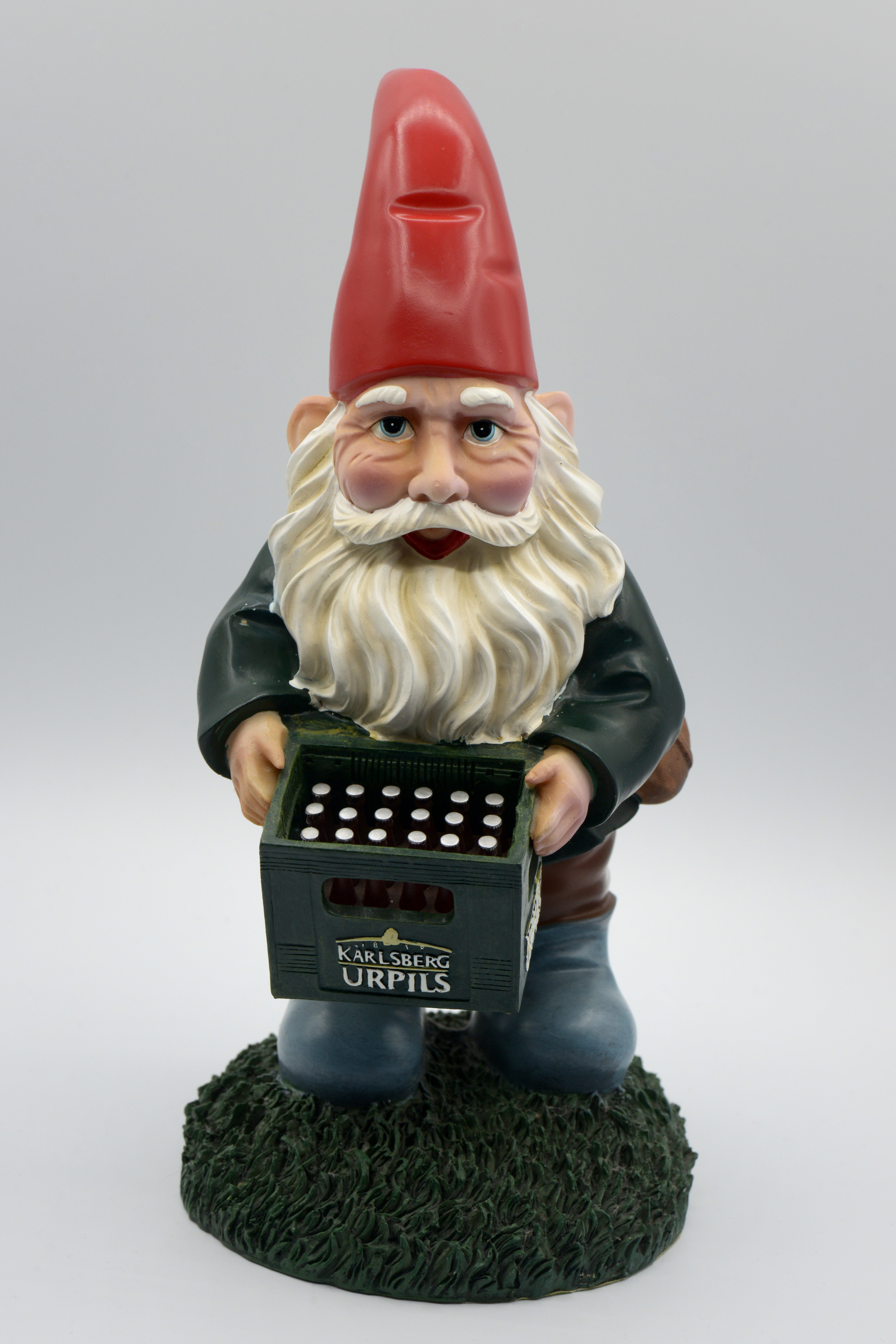 Gartenzwerg Hansi UrPils als Image-Träger der Karlsberg Brauerei in Homburg, Saarland/ Deutschland. Herausgegeben 2004. Höhe der Figur ca. 25 cm.